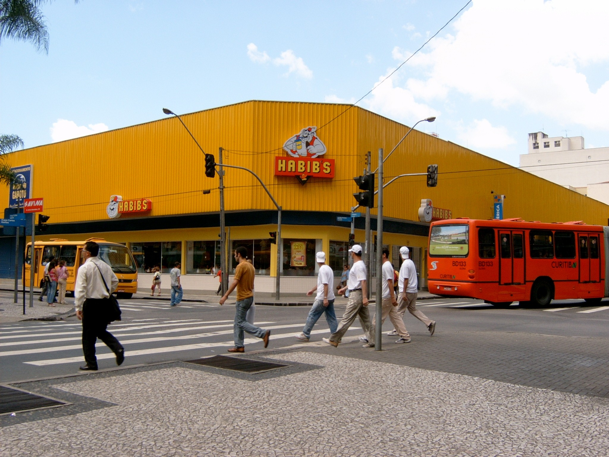 Restaurante Habib's em Curitiba